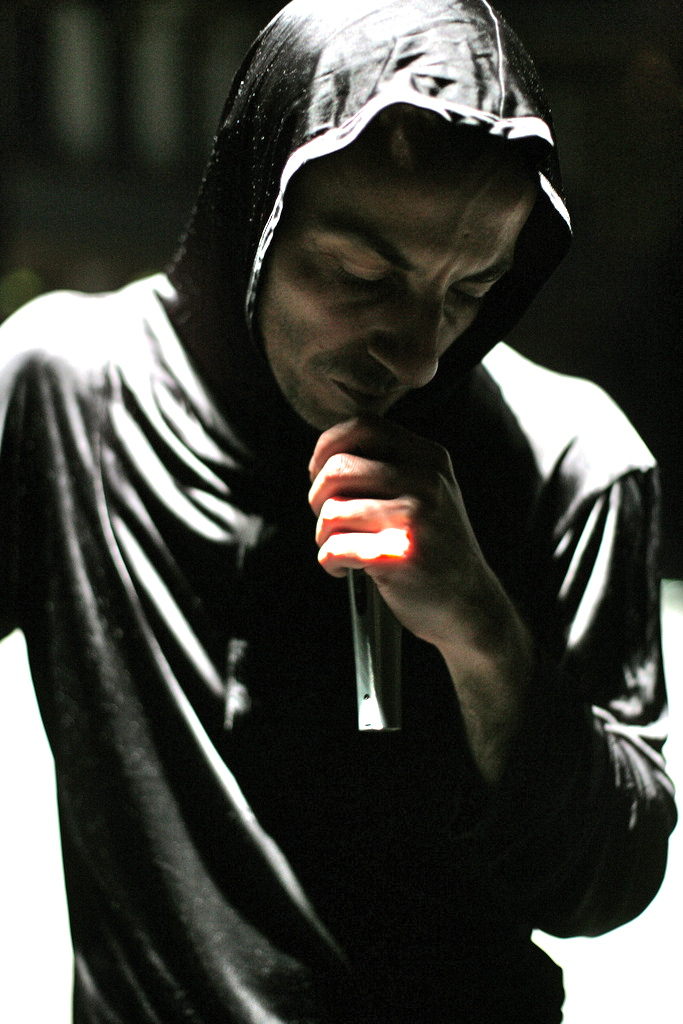 Rachid Ouramdane dans Loin... en 2008